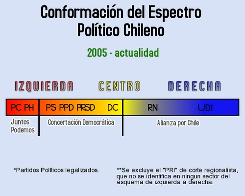 Gráfica que representa la actual organización del espectro político chileno.